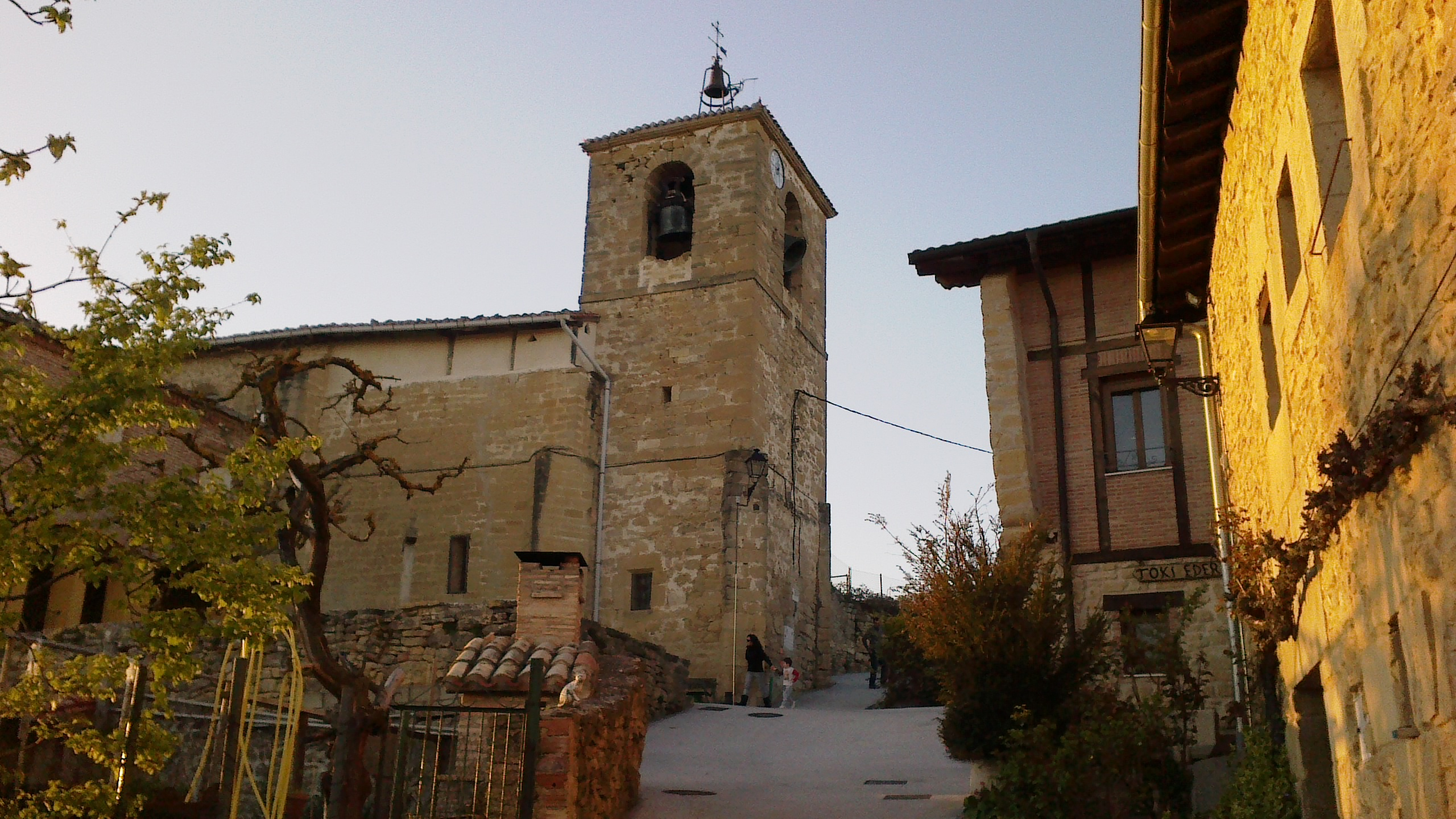 Tuyoko eliza (Erriberagoitia, Araba), hegoaldetik ikusia